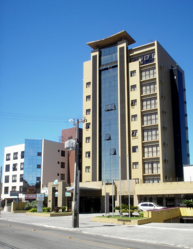 Edifícios localizados na Av. Camilo di Lellis, no centro de Pinhais, PR.